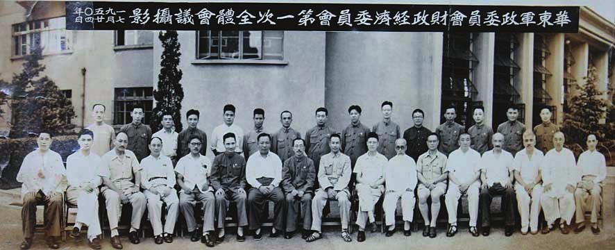 中文（香港）: 華東軍政委員會財政經濟委員會第一次全體會議攝影，1950年7月24日